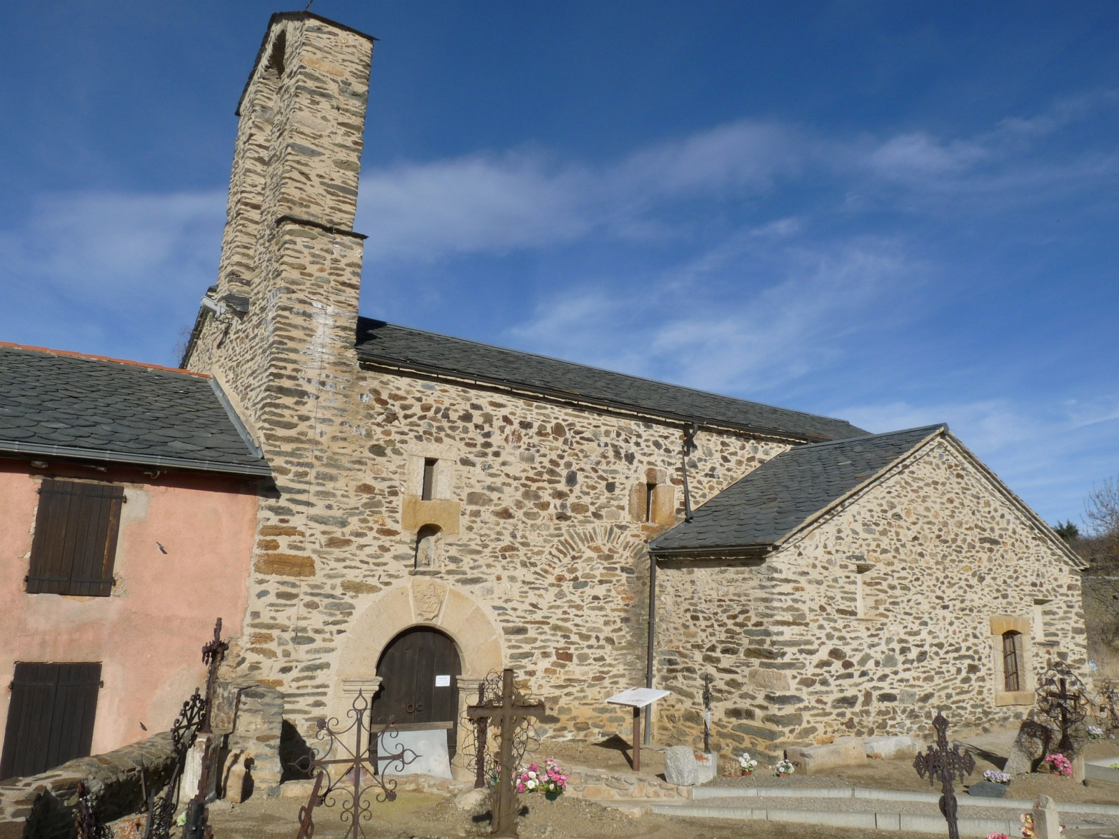 Eglise de Nahuja, Pyrénées-Orientales, France